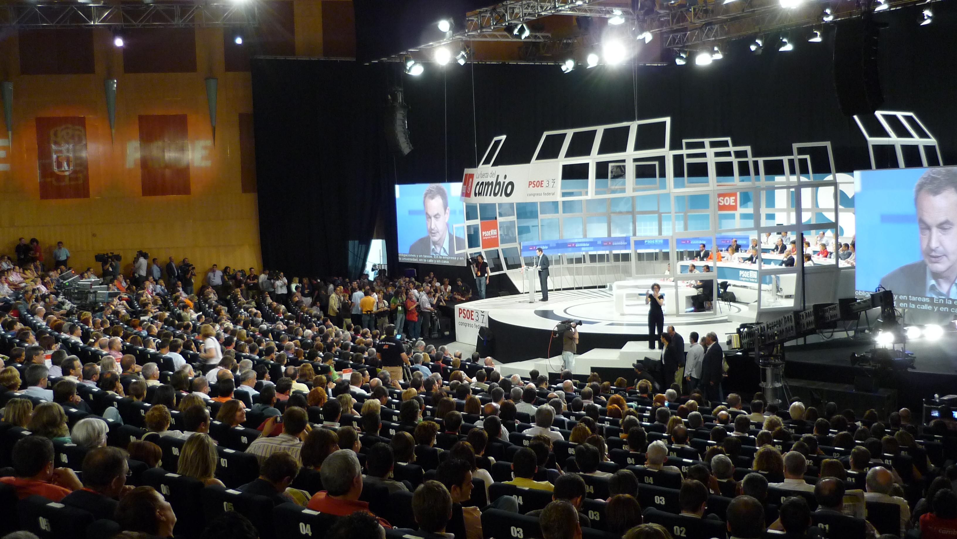 37 Congreso PSOE en julio de 2008.